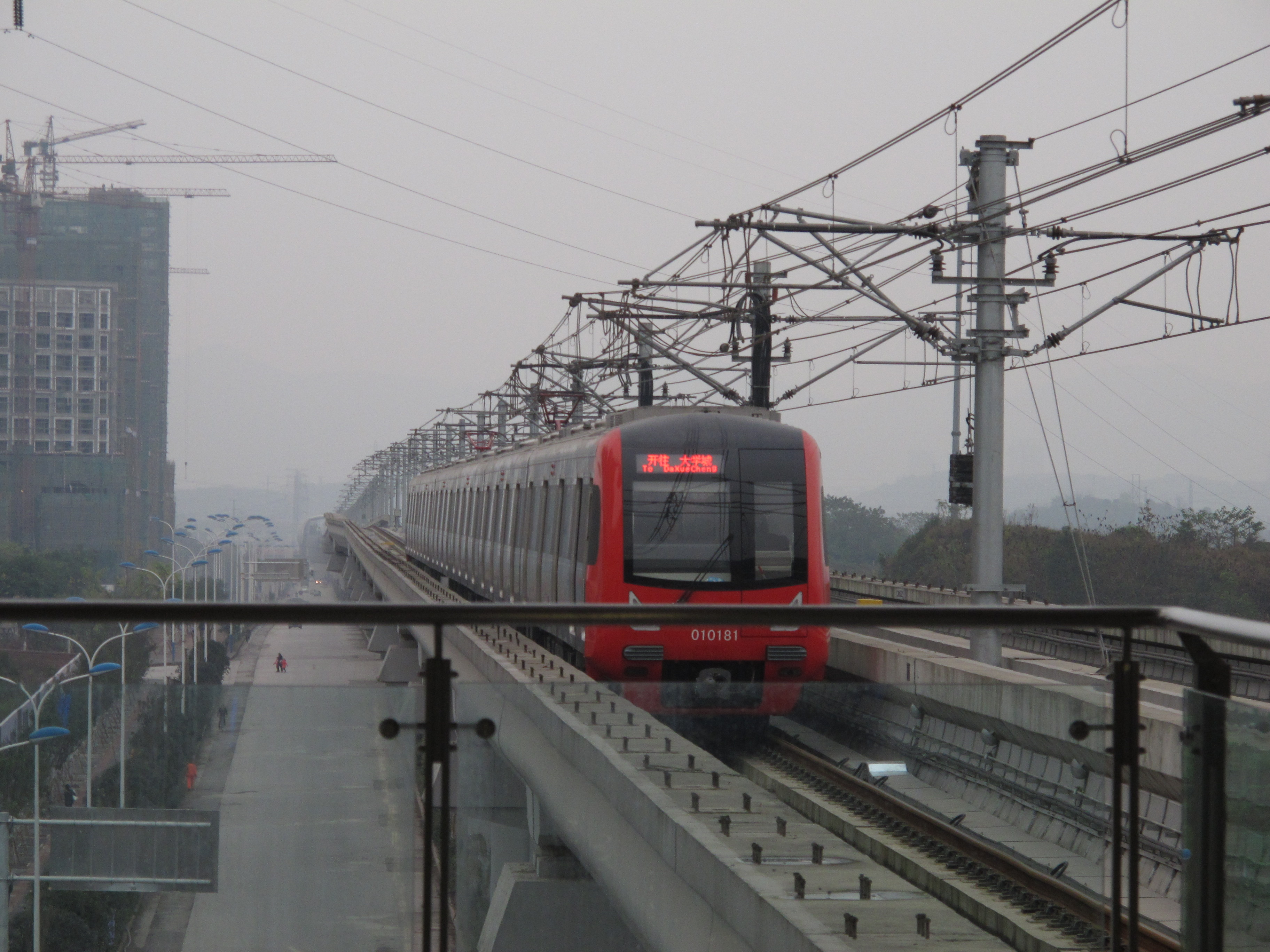 重庆轨道交通1号线列车进入终点站大学城站